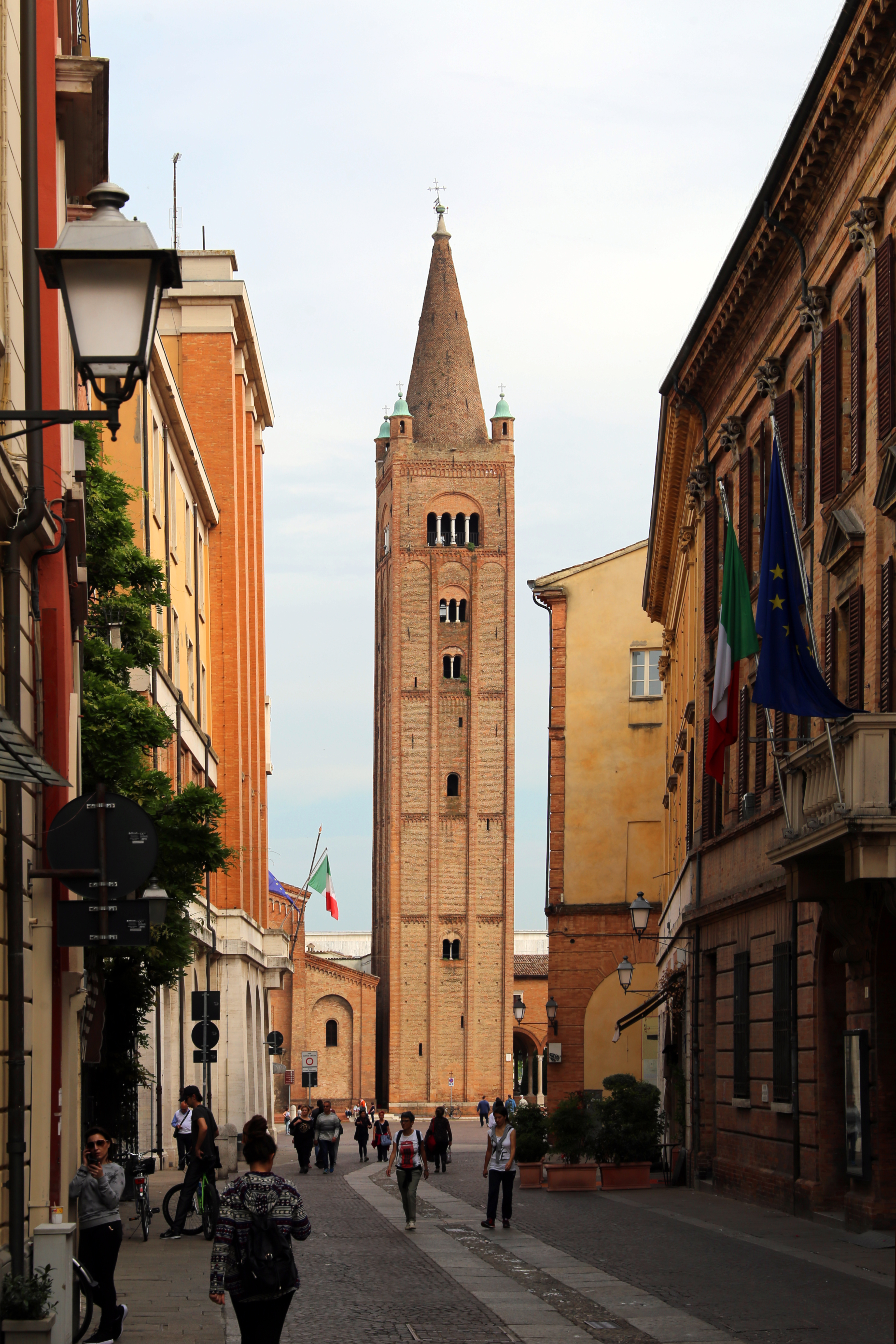 abbazia di San Mercuriale This is a photo of a monument which is part of cultural heritage of Italy.